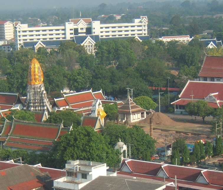 Der Wat Radscha Chinarat (Wat Yai) in Phitsanulok, Thailand, im Hintergrund die Provinzverwaltung